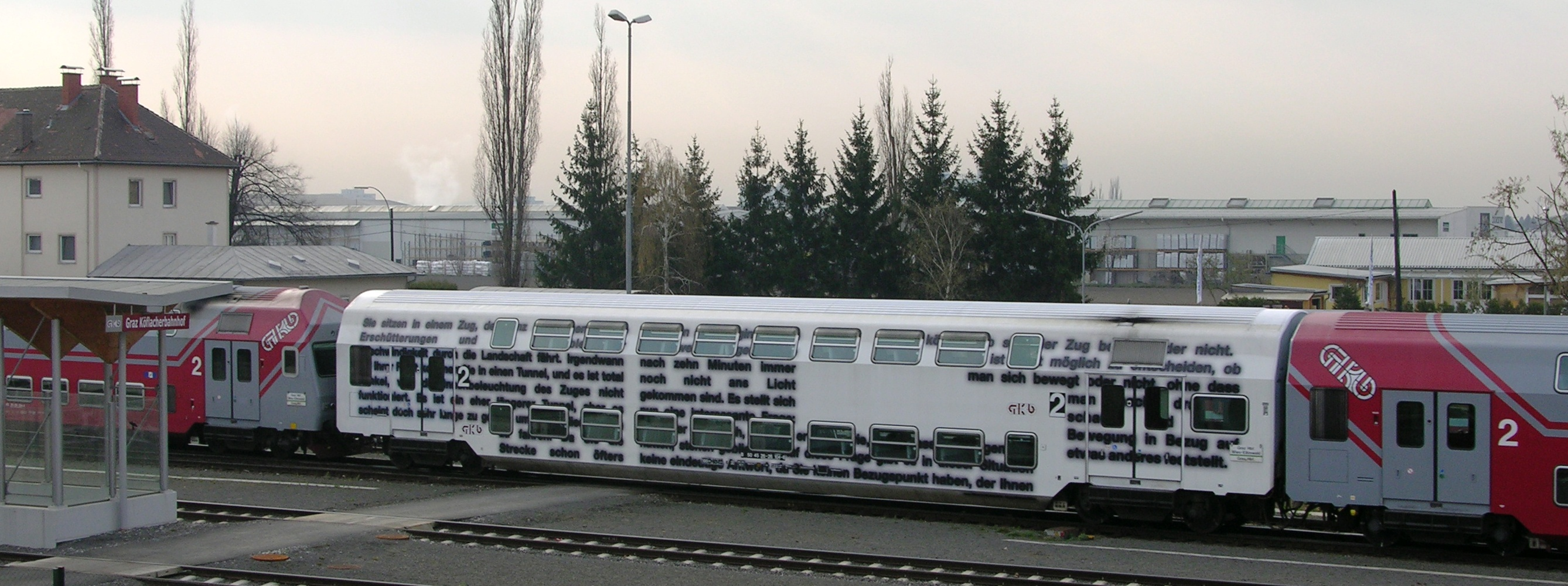 GKB Doppelstockwagon gestaltet von Eva Schlegel